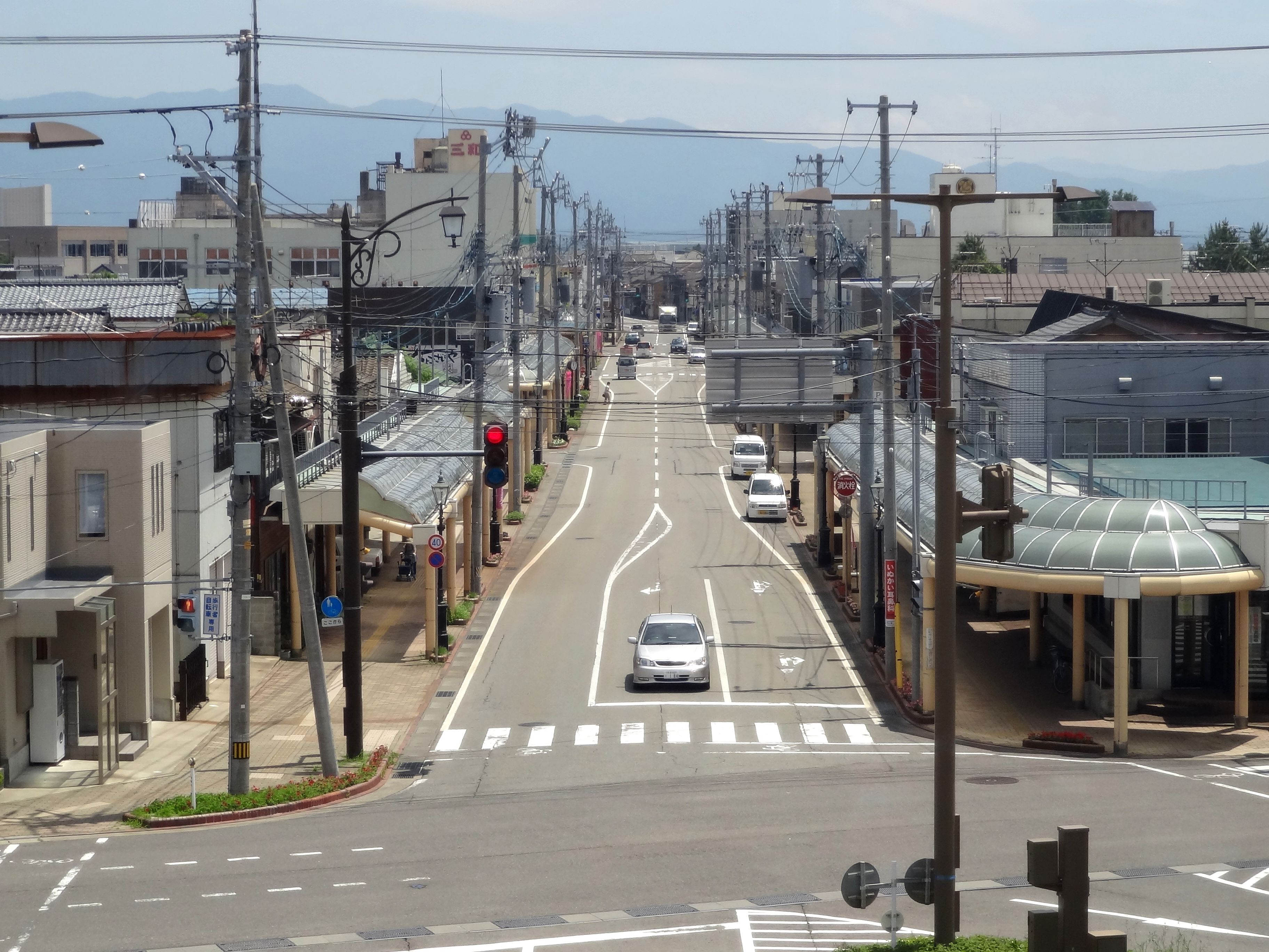 豊栄市街（新潟市北区中心部）